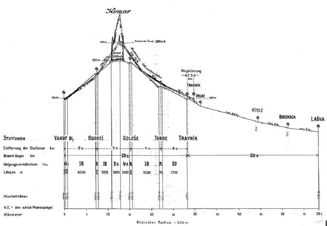 Nach der Station Goleš beginnt die Zahnradstrecke zum Komarsattel mit 45 Promille Steigung. Zusammen mit der Westrampe vom 1362 Meter langen Komartunnel hinunter nach Oborci hatten die Zahnstangenabschnitte eine Länge von 6,8 Kilometer. Das Diagramm zeigt das Projekt eines zweiten 3100 Meter langen Scheiteltunnels. Die weniger steilen Zufahrtsrampen hätten die Aufhebung des Zahnradbetriebs erlaubt.